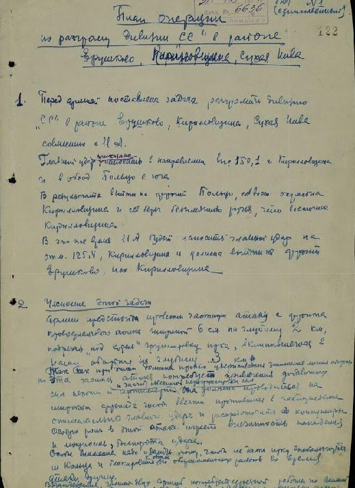 Военный документ